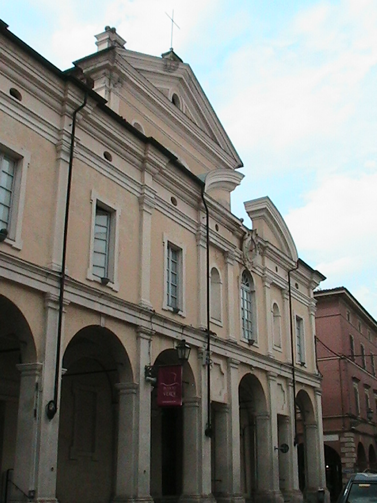 Busseto - Chiesa di Sant'Ignazio